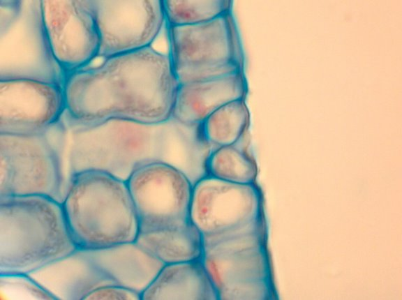 dwars doorgesneden huidmondje in het blad van een dicotyle